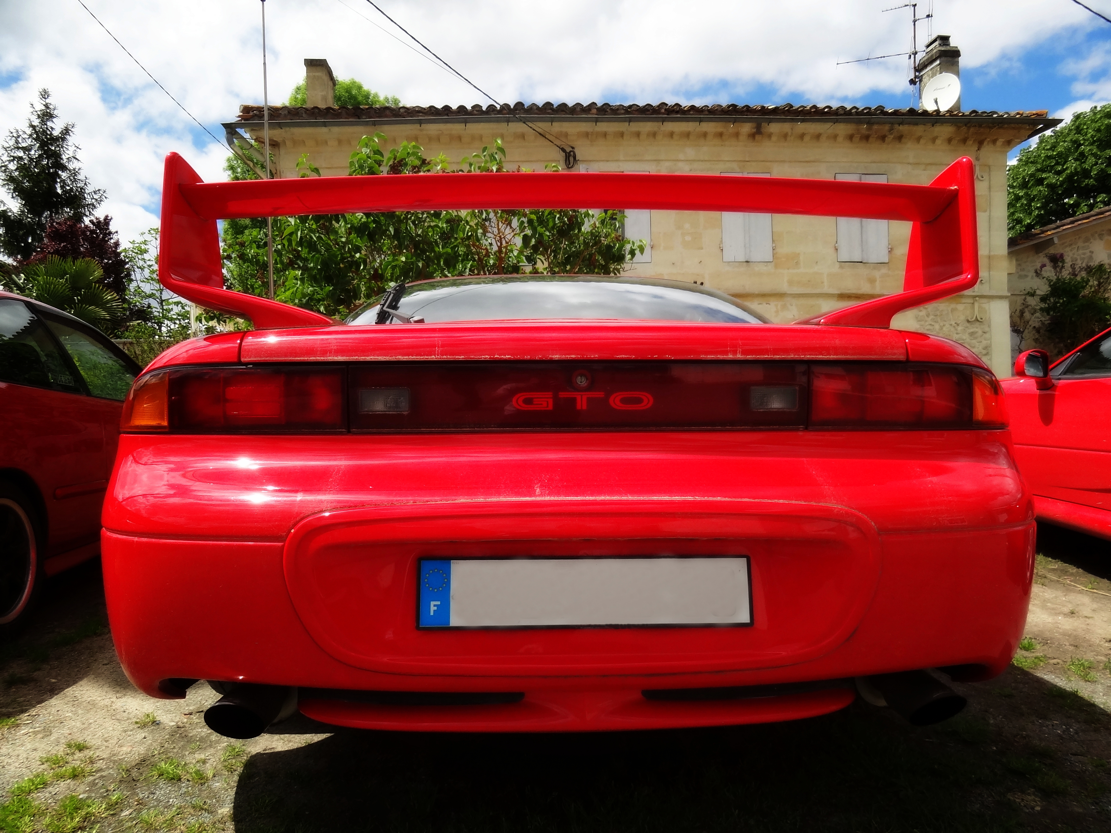 330cv bi-turbo 427 Nm à 2 500 tr/min 4 roues motrices, 4 roues directrices, 2 différentiels à glissement variable (1 central + 1 arrière) 1 760 kg Vitesse maximale 300 km/h Accélération0 à 100 km/h en 5,4 s